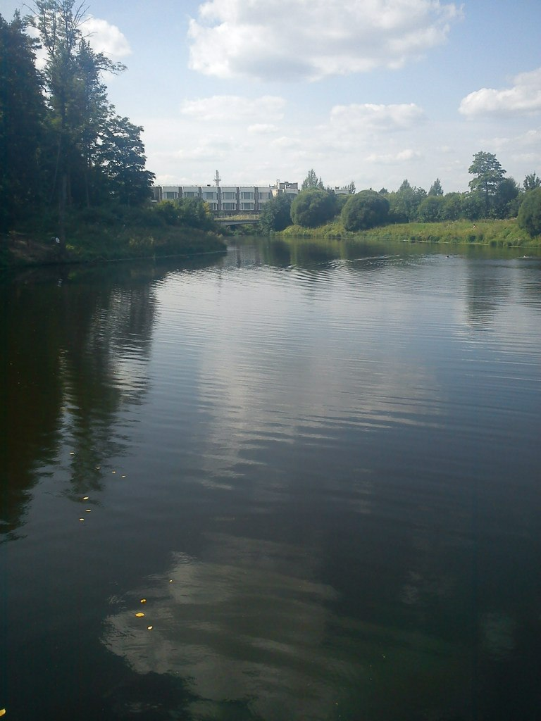 Баболовский пруд в Баболовском парке Пушкина (Санкт-Петербург)